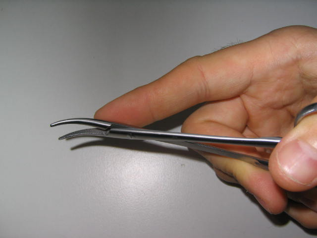 Hier sieht man die Backen des Overholts. Sie tragen feines Riffelmuster. Dies ist ein Kompromiss zwischen atraumatischem und doch sicherem Fassen.